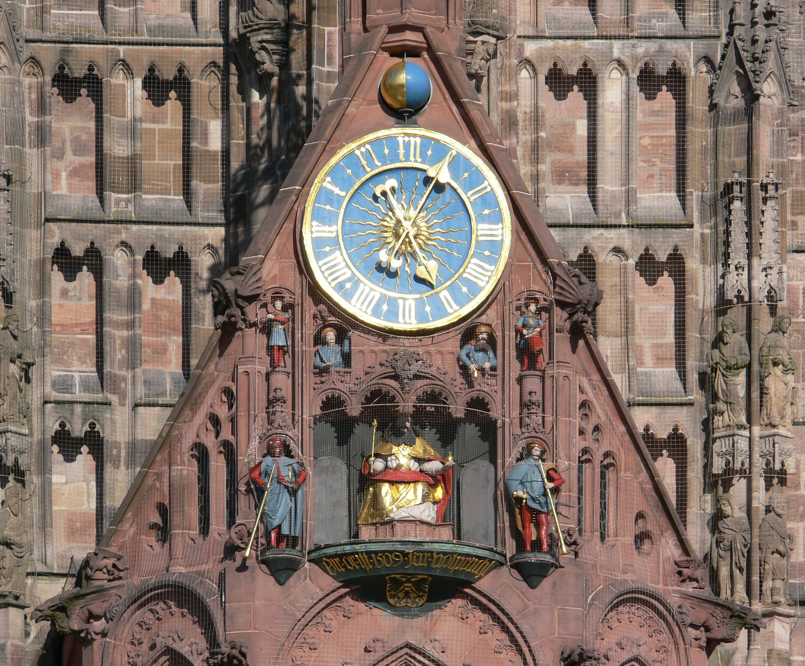 Nürnberg, Uhr der Frauenkirche (Fassade zum Hauptmarkt)